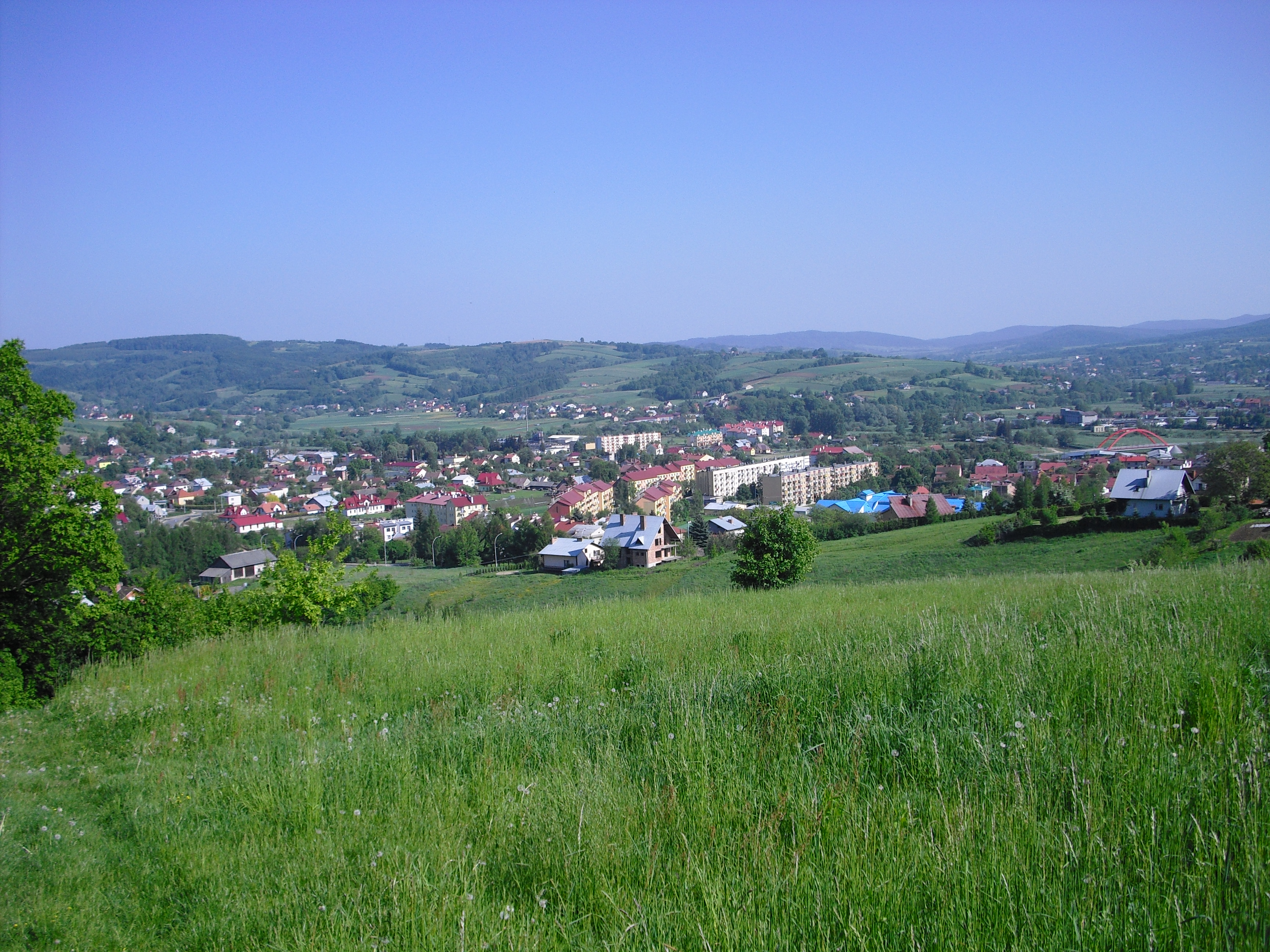 Panorama Strzyżowa - część wschodnia